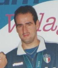 Il Personal Trainer Paolo Tassetto con lo schermidore Matteo Zennaro